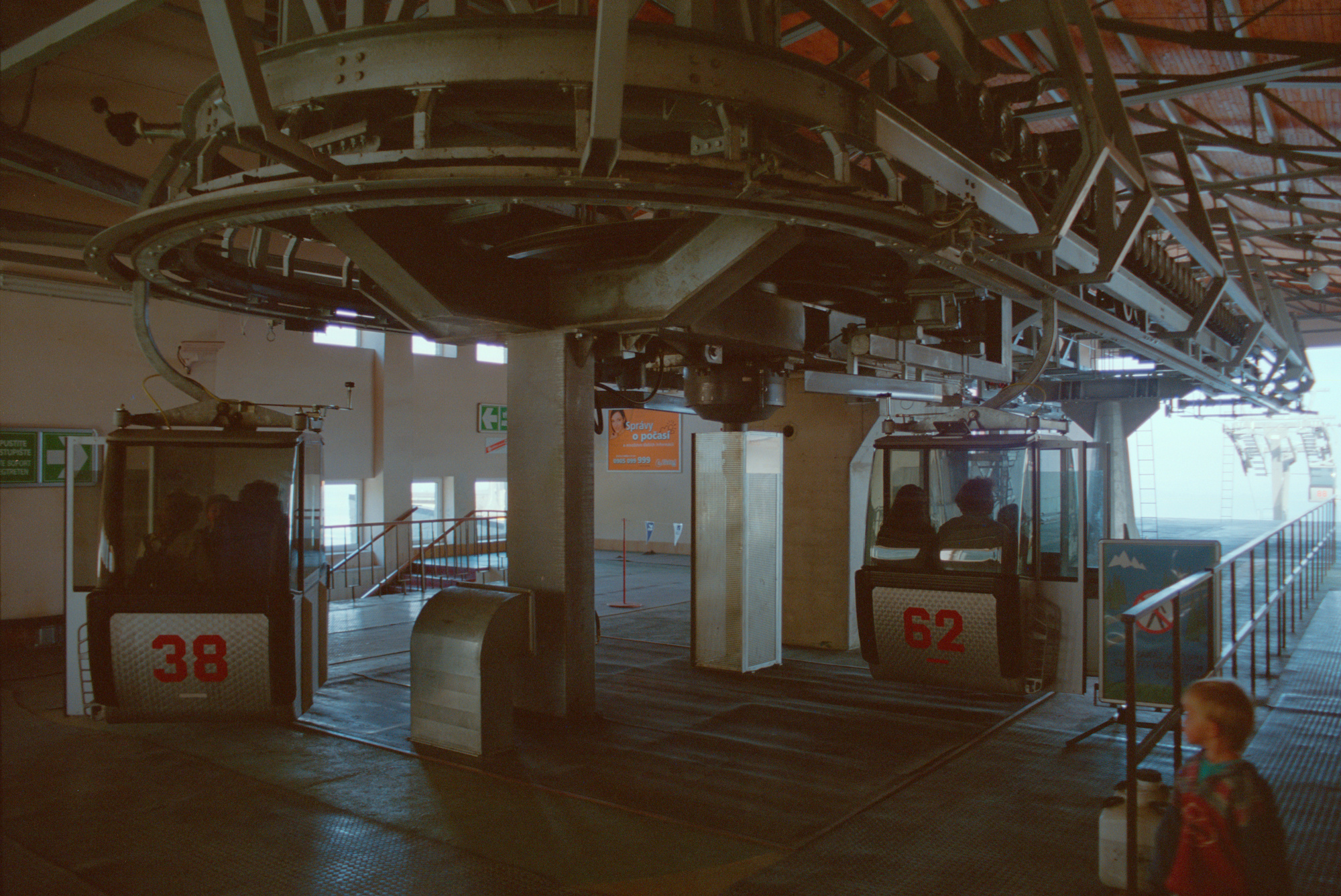 Skalnaté pleso, horná stanica kabínkovej lanovej dráhy own picture, taken in summer 2000